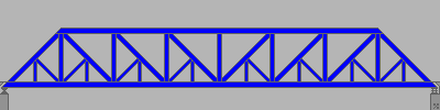 Baltimore Fachwerk Brücke